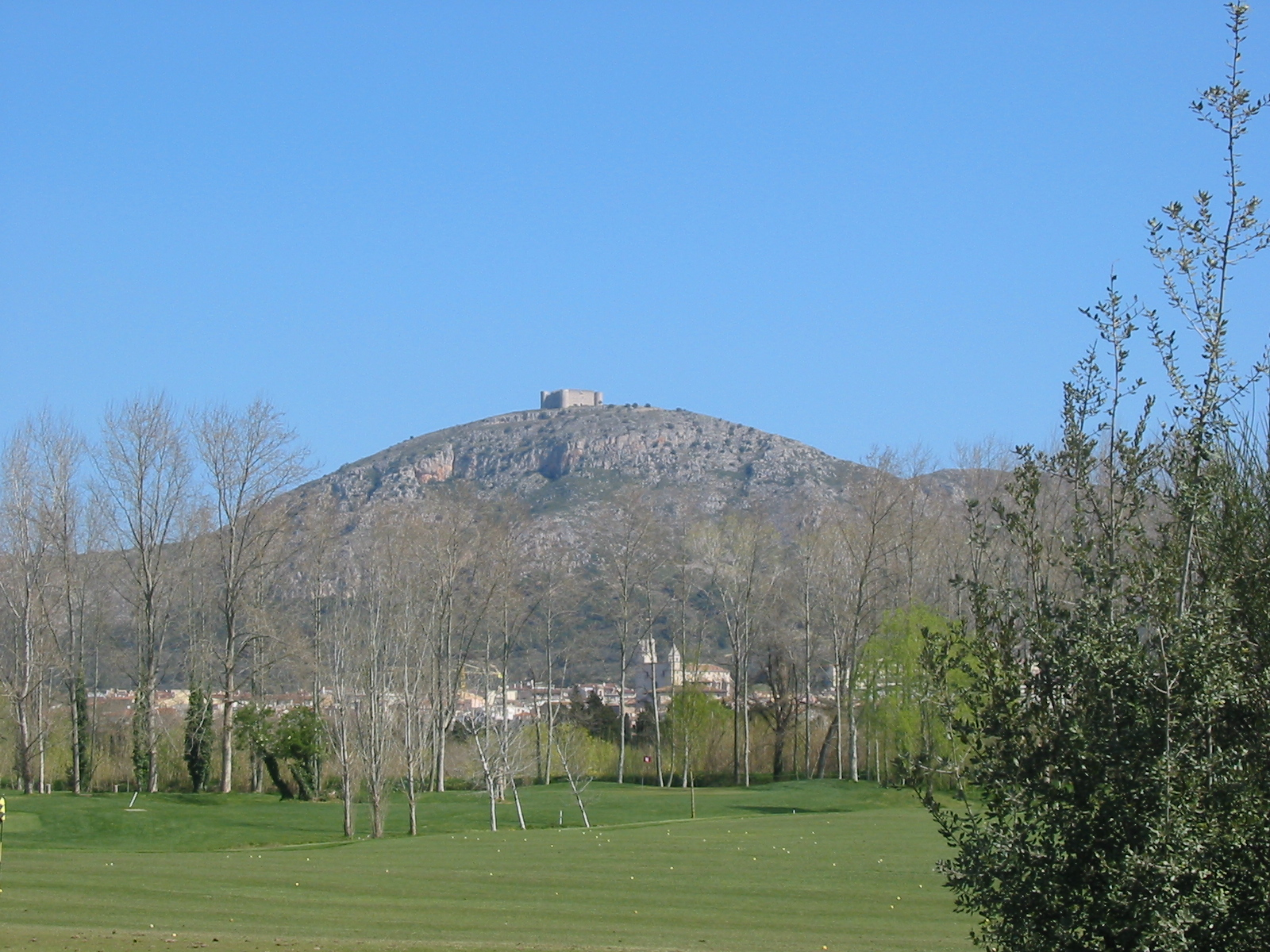 Gualta Golf, near Toroella de Montgrí, Costa Brava, Catalonia